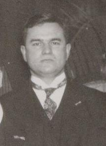 Karel Henri Broekhoff (1886-1946); Hoofdcommissaris van politie te Amsterdam 1945-1946/ Chief Constable of the Amsterdam Police 1945-1946